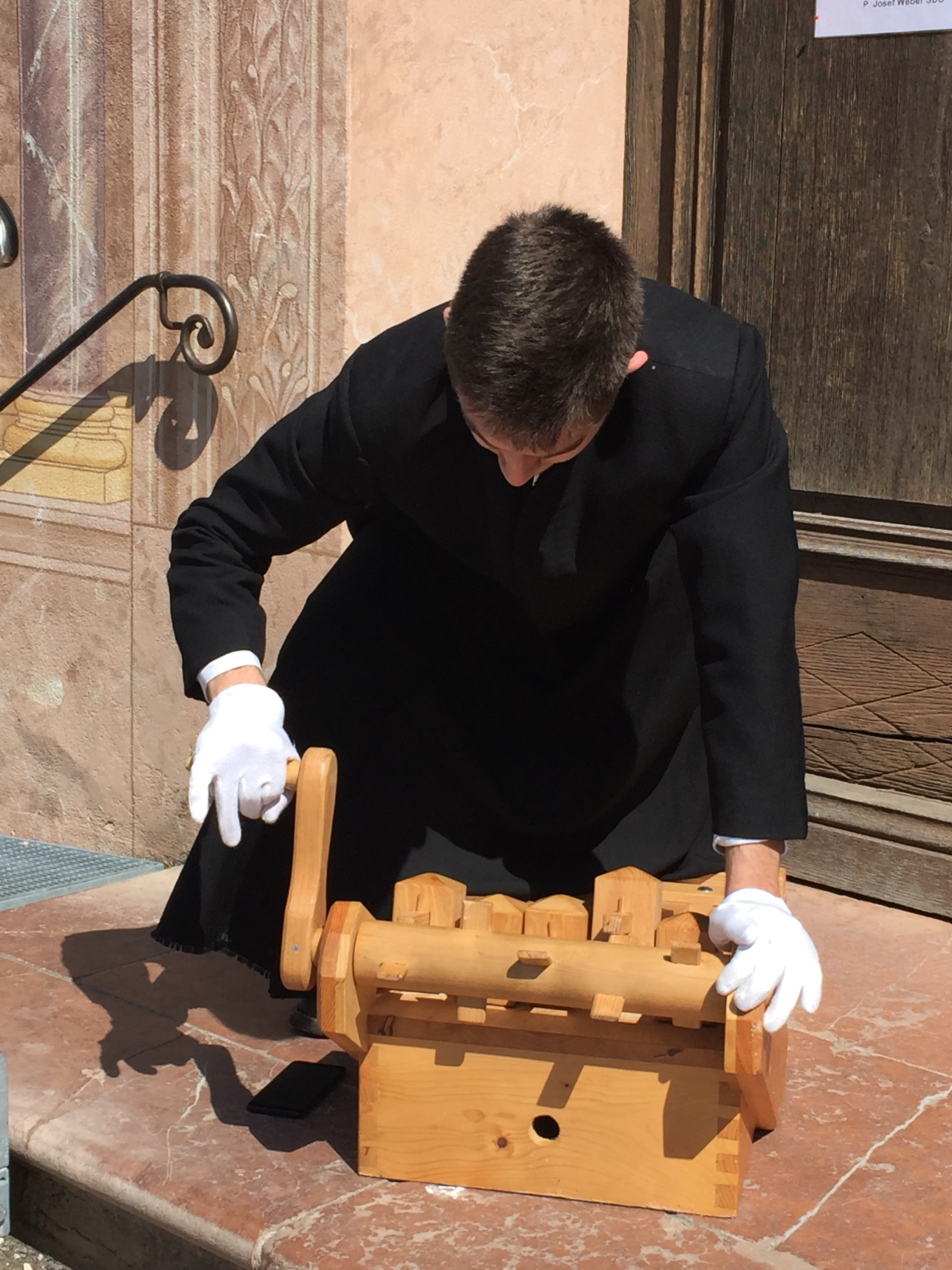 Ein Mönch des Klosters Benediktbeuern dreht vor der Kirchentür der Klosterkriche St. Benedikt an der Ratsche, um am Karfreitag zur Messe einzuladen, da die Glocken an diesem Tag nicht geläutet werden dürfen.